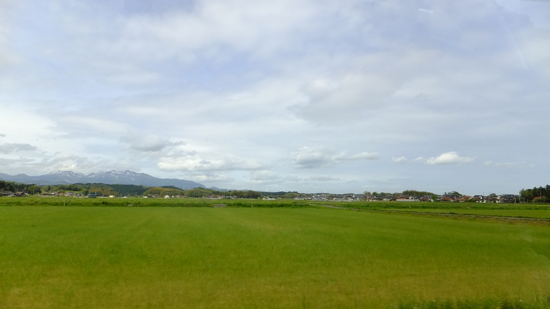 鳥取県東伯郡北栄町穂波